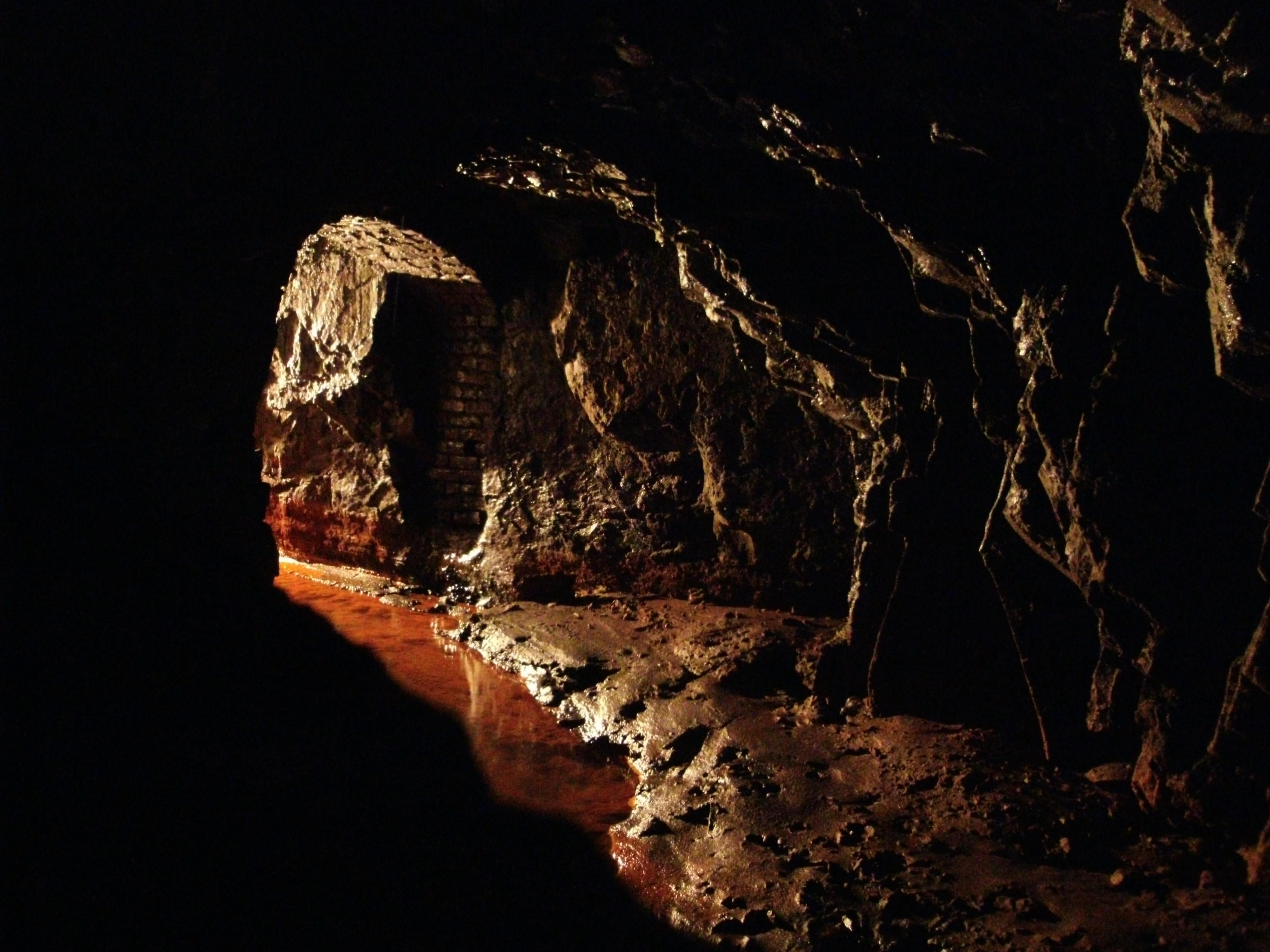 Ein Nebengang im Besucherbergwerk Grube Wohlfahrt (Bleierzgrube) in Hellenthal-Rescheid. Der Gang dient der Wasserableitung.